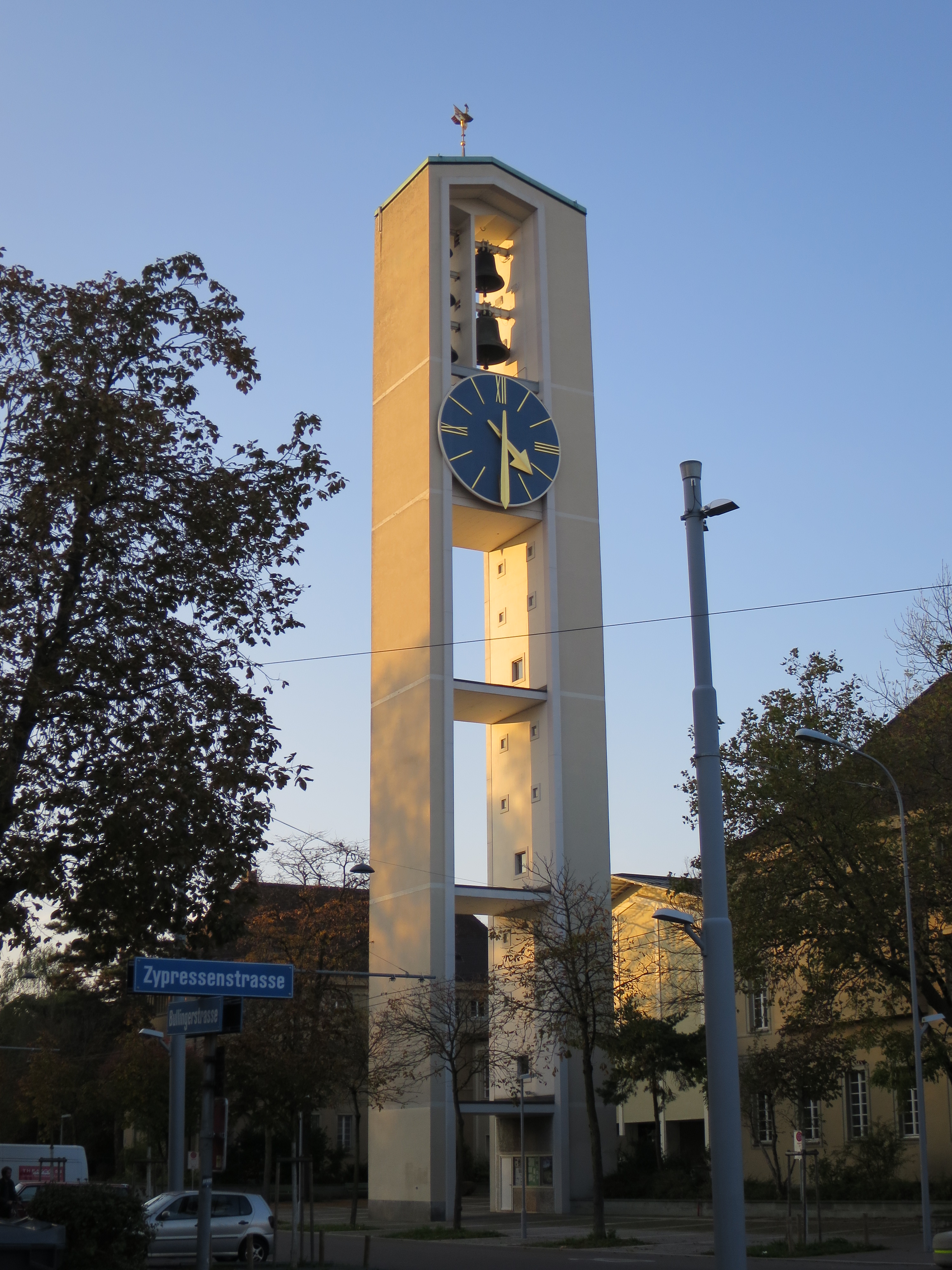 Bullingerkirche Zürich-Hard - Campanile